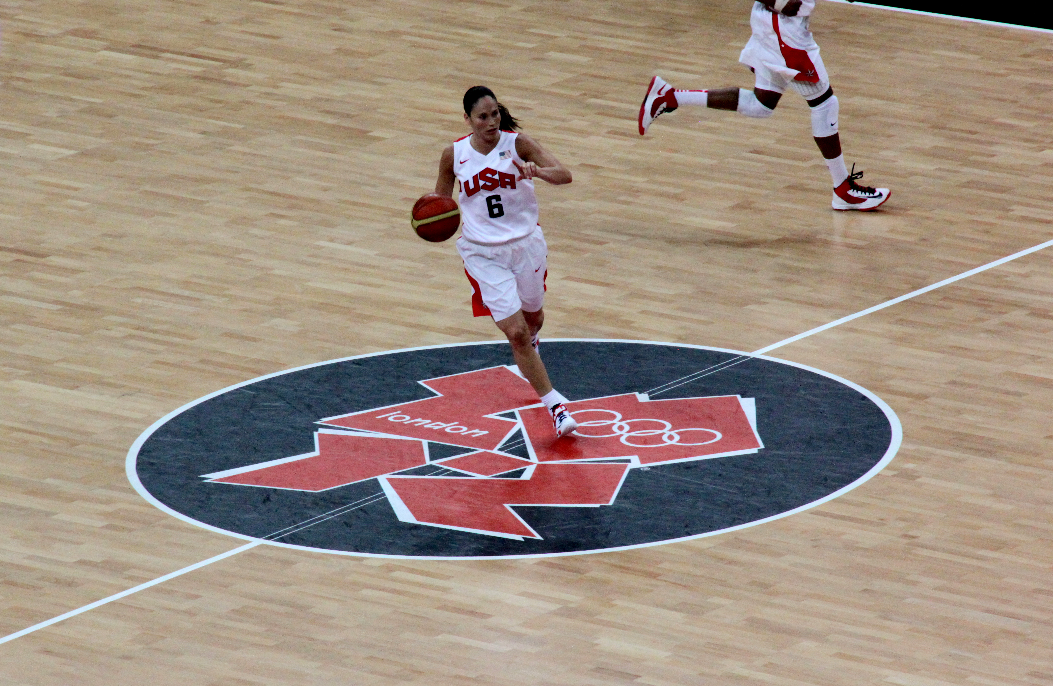 Sue Bird